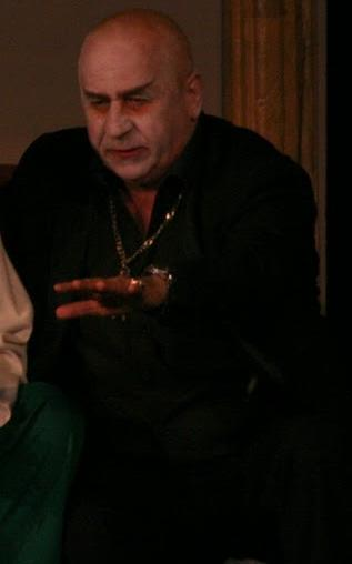 George Mihăiţă în Poker - Teatrul de Comedie